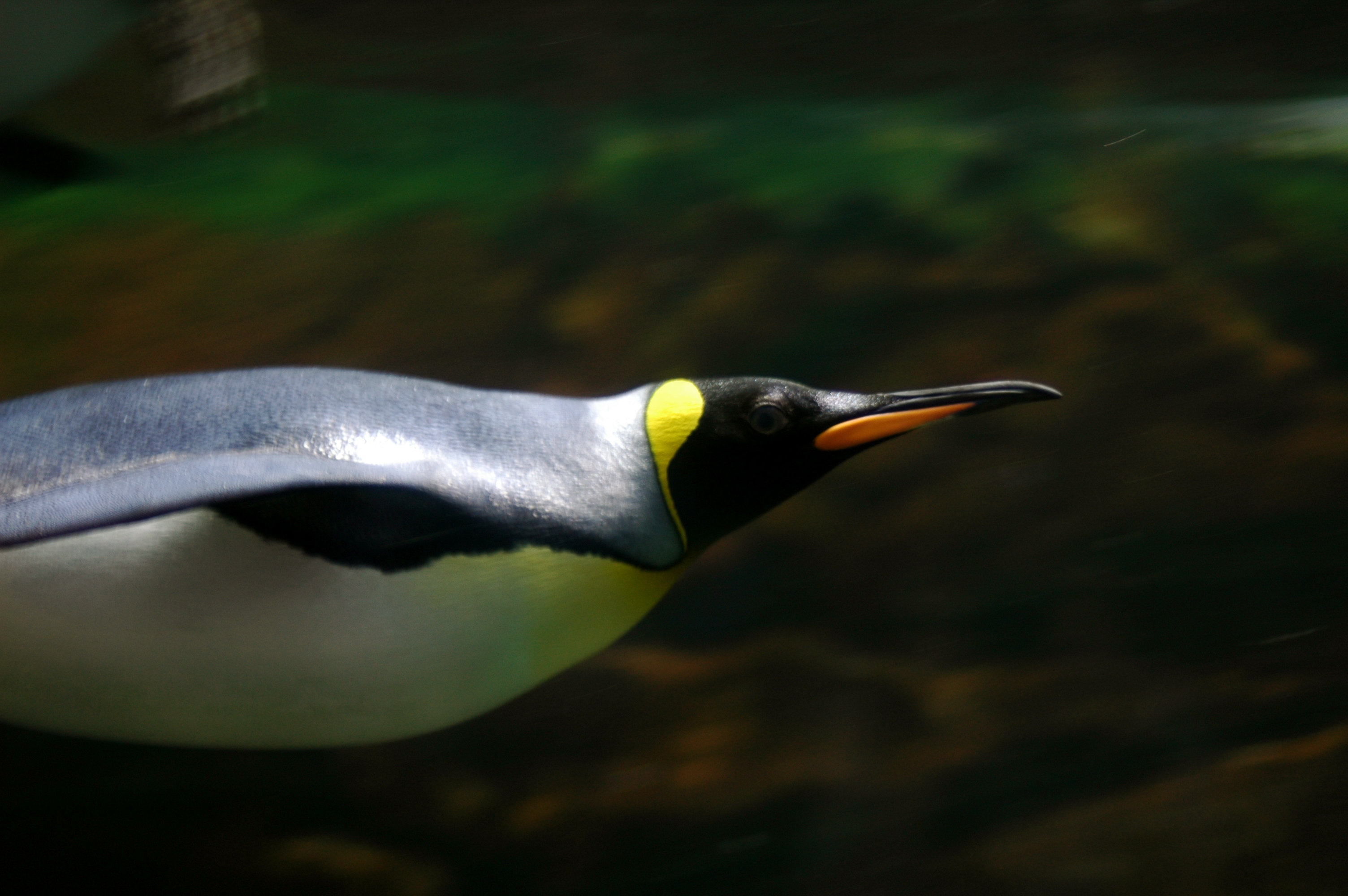 King penguin swimming under water.